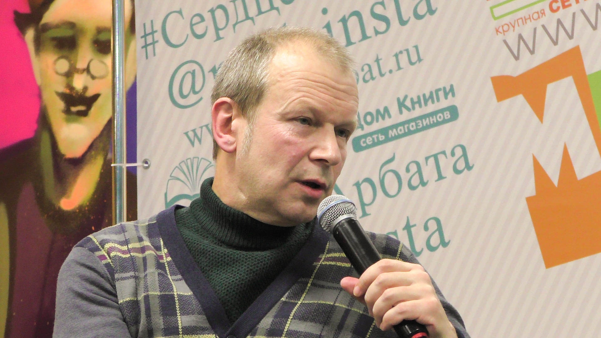 03.02.2017. Московский Дом Книги.